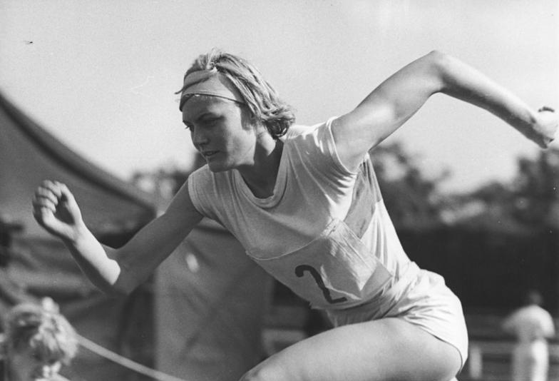 Inge Exner Zentralbild Wendorf 08.08.1965 Potsdam: Deutsche Mehrkampfmeisterschaften der Leichtathleten. Nach dem ersten Wettkampftag am 7.8.65 im Potsdamer Luftschiffhafenstadion führt bei den Frauen die Titelverteidigerin Inge Exner (SC Motor Jena) . Hier beim Start während der Weittsprung-Konkurrenz am 8.8.65.